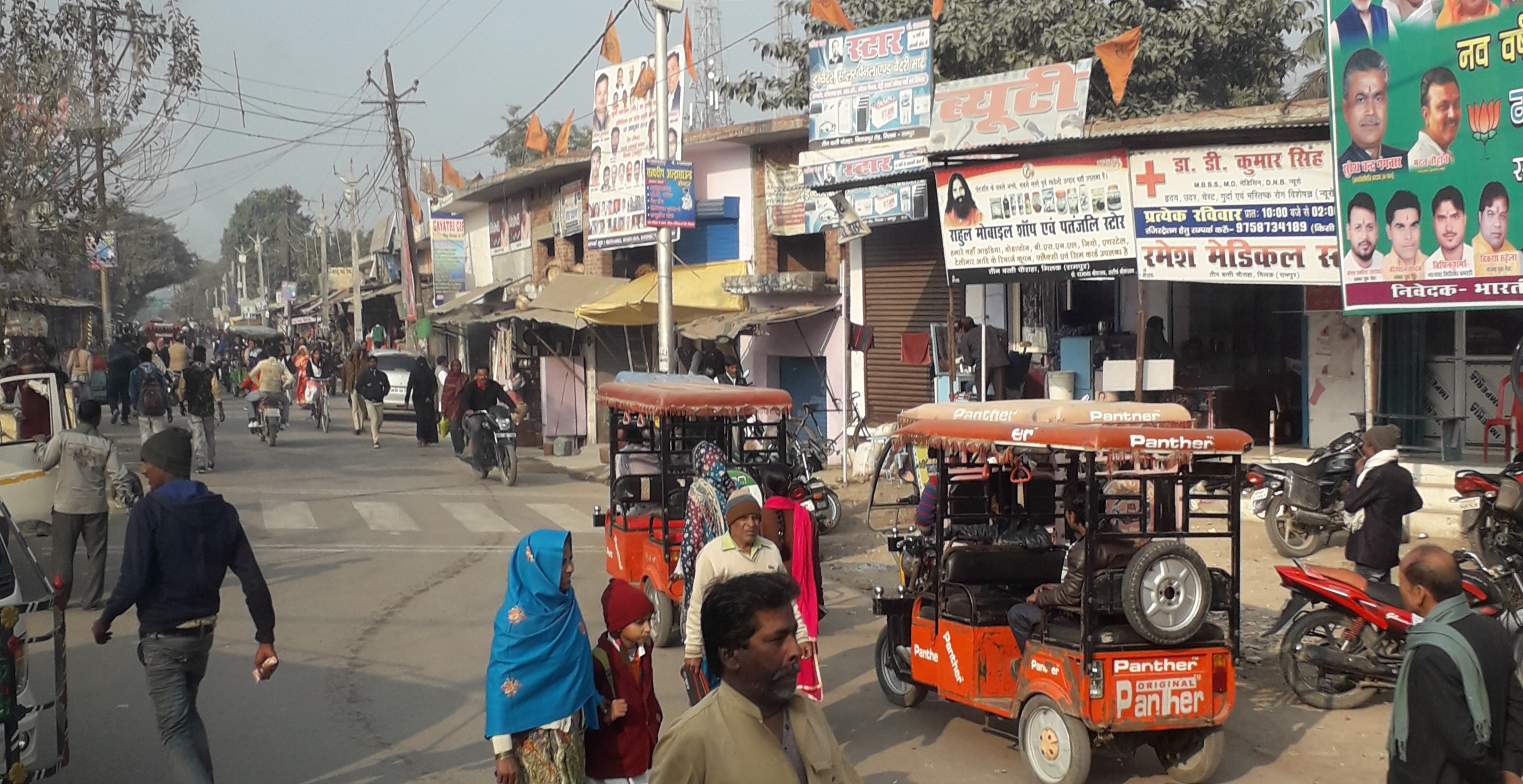 Bilaspur road, Milak, Rampur, UP